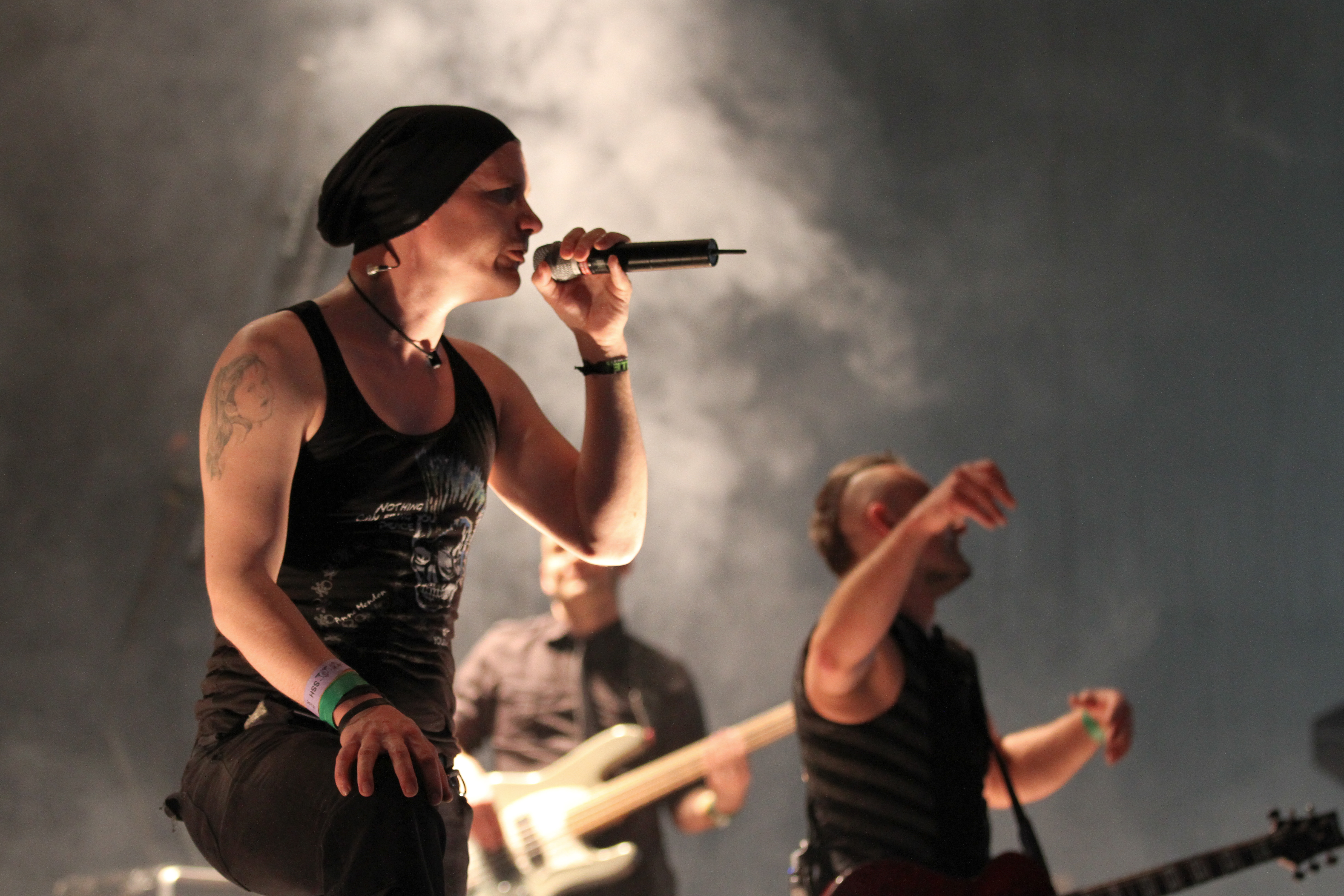 Wave-Gotik-Treffen w 2013 r. w Lipsku.